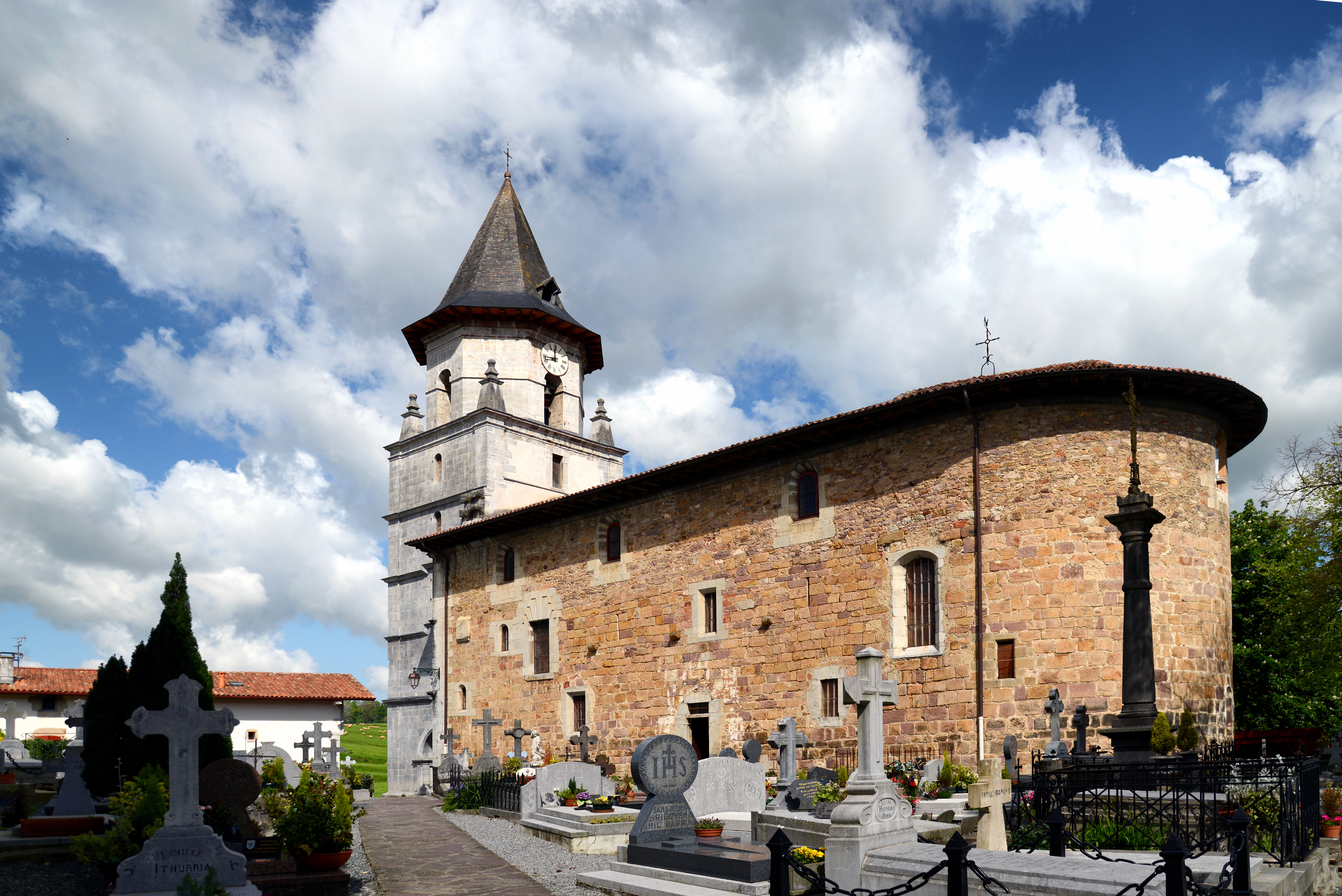 Ainhoa, Pyrénées-Atlantiques (Aquitaine) - Église Notre-Dame de l'Assomption, du 13e siècle.